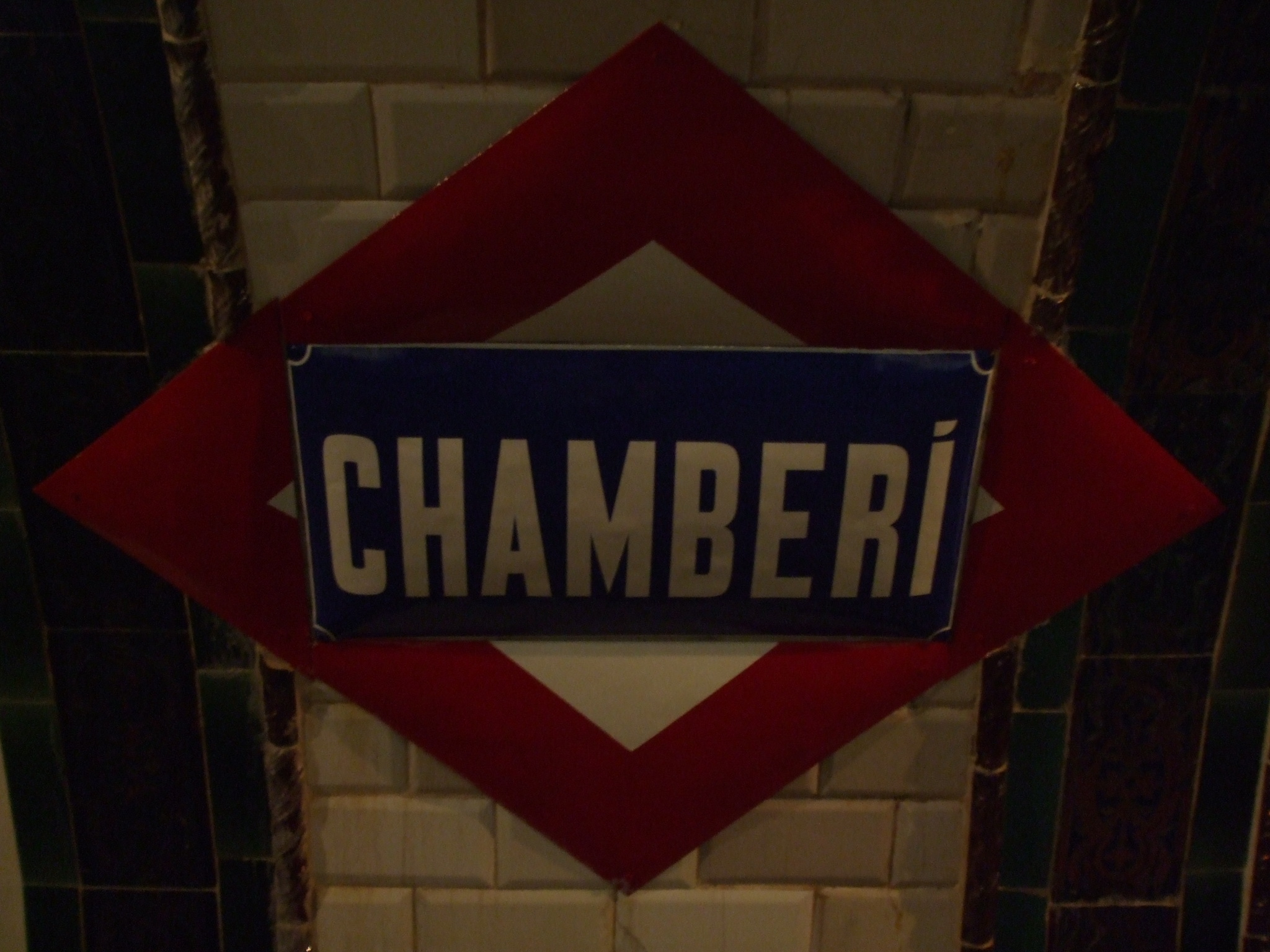 Estación de Chamberí Distintivo de la estación